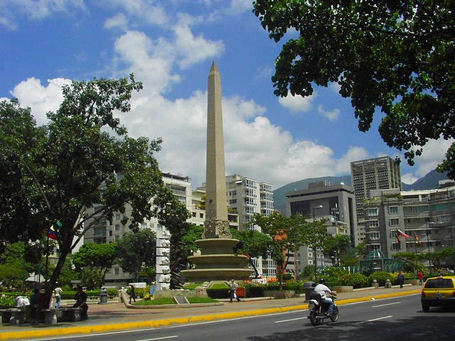 Plaza Francia of Altamira, Chacao Municipality , Miranda State, Venezuela.